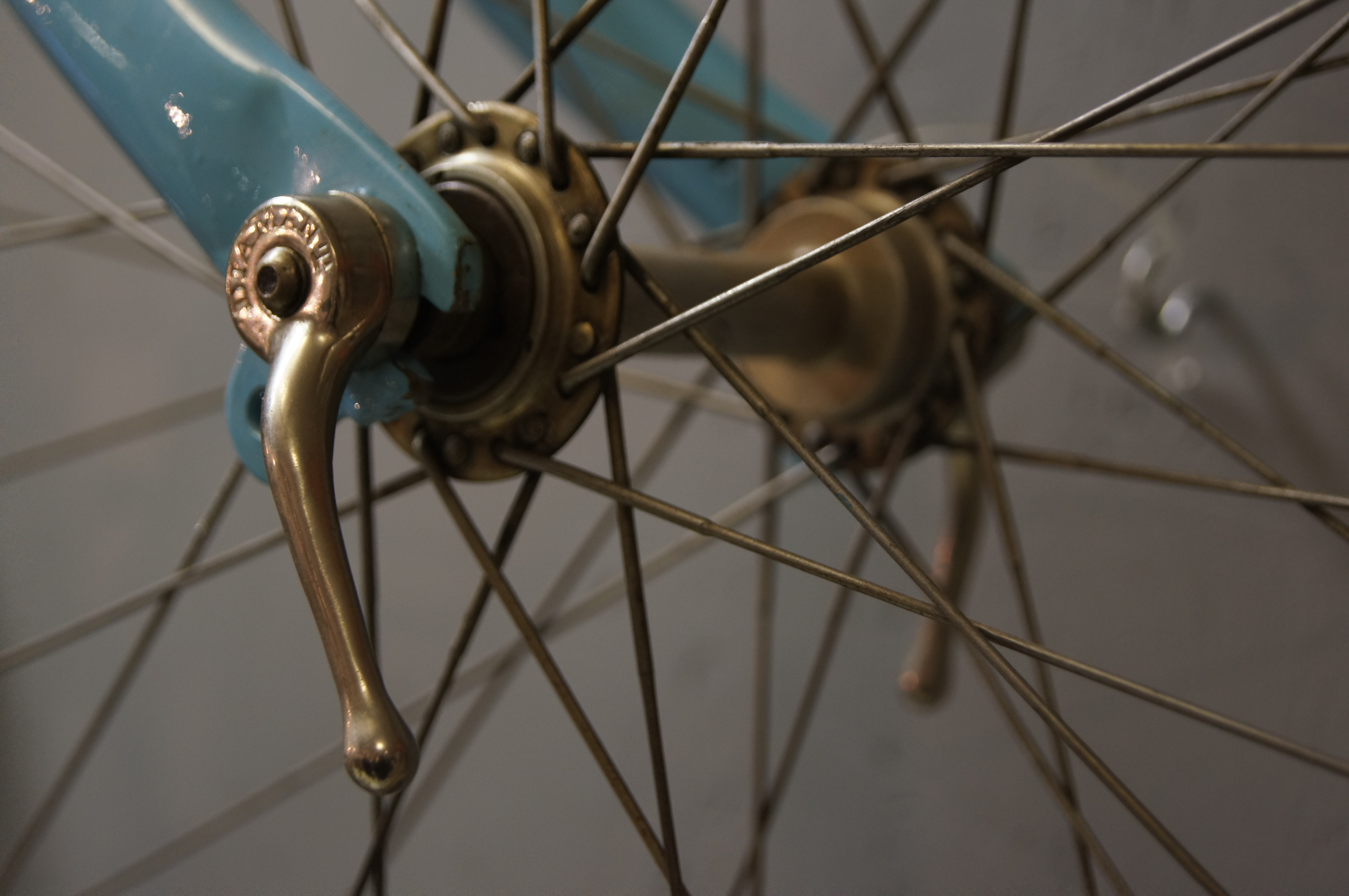 Vorderrad Schnellspaner